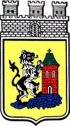 Wappen von Dülken